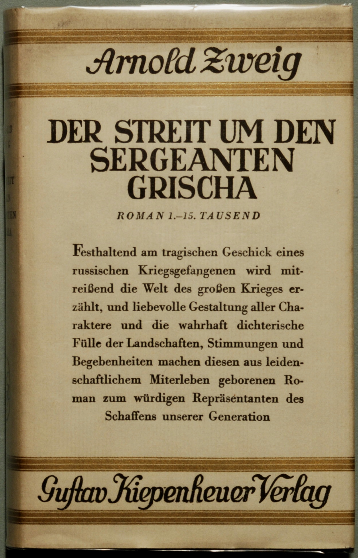 Zweig, Arnold: Der Streit um den Sergeanten Grischa. Roman Potsdam: Kiepenheuer 1928, 552 Seiten + 1 Blatt Nachbemerkung + 1 Blatt Inhalt. Erstdruck (Wilpert/Gühring² 34). Original-Verlagsumschlag (in Klarsichtfolie eingeschlagen).